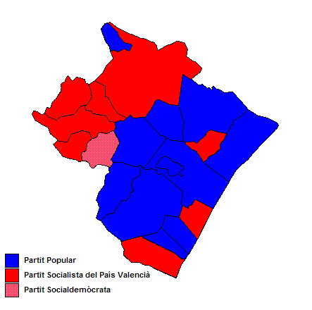 Partits polítics més votats als municipis de la Plana Baixa (País Valencià) després de les eleccions municipals de 2007.